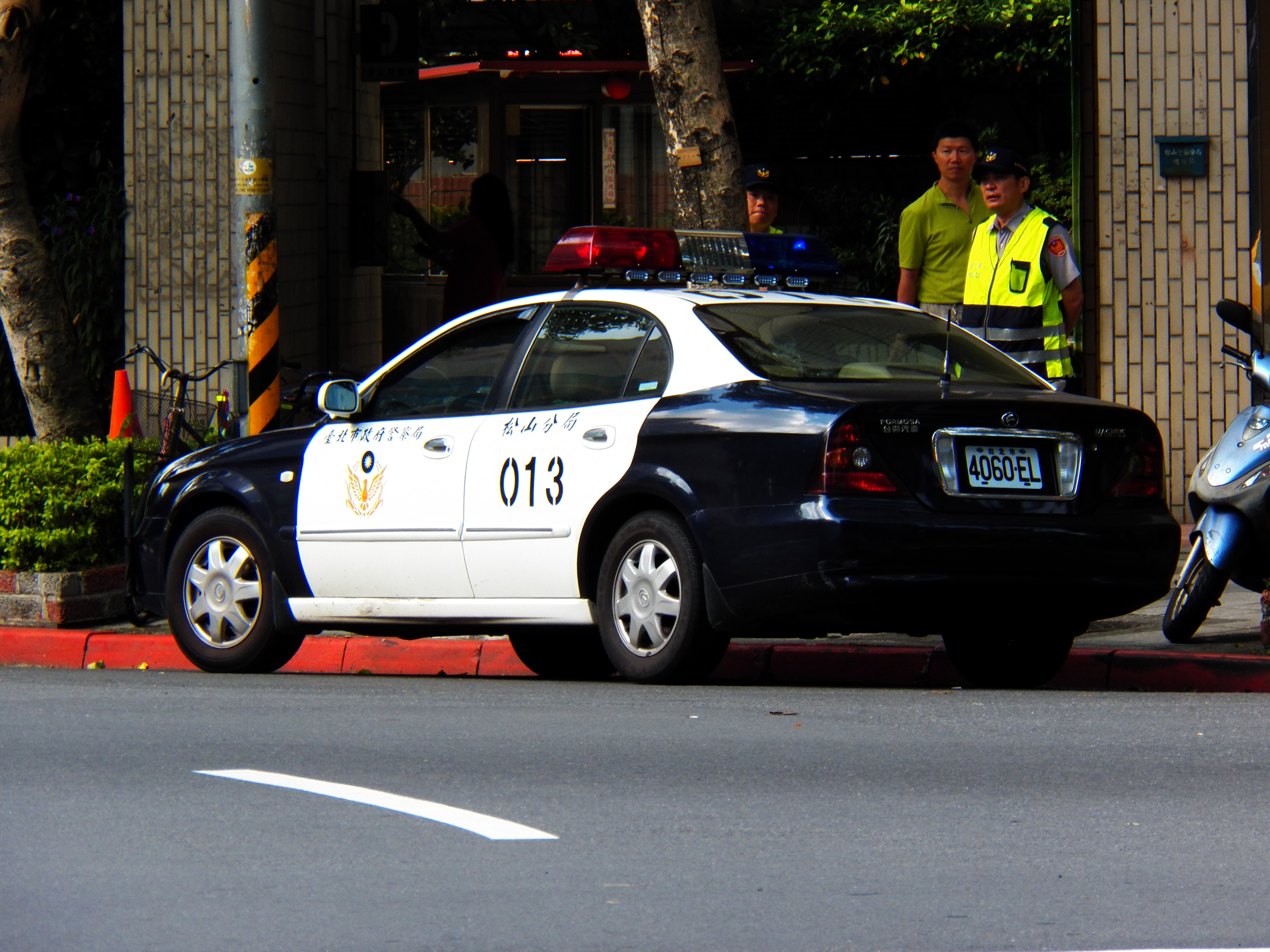 中文（台灣）: 臺北市政府警察局松山分局台朔汽車Magnus（台朔一號）警車4060-EL，攝於臺北市松山區民生圓環。